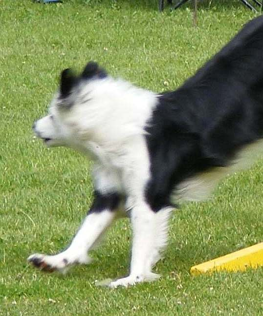 Bei Sprüngen kommt es oft zur Überdehnung des Handgelenkes, das ist aber durchaus im rahmen des normalen bewegungsablaufes